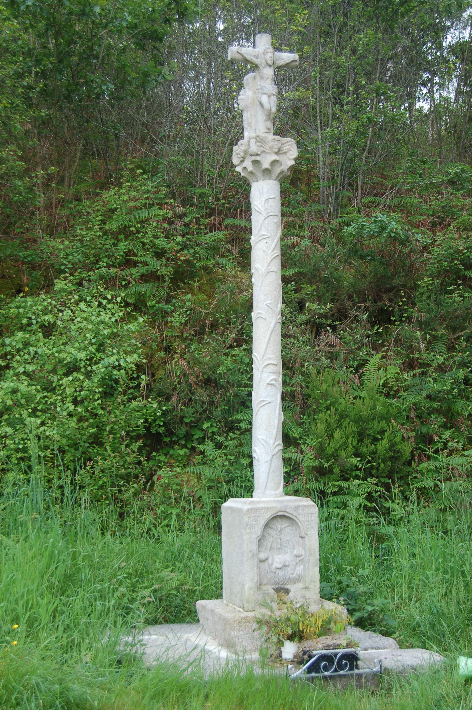 Cruceiro de Barreiros, na Vilalén (Loureiro, Cerdedo-Cotobade)